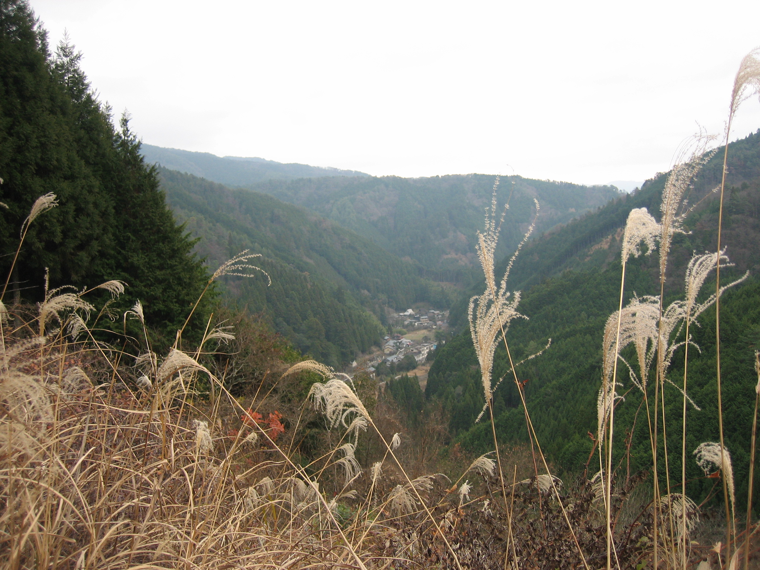 持越峠頂上付近から、雲ヶ畑集落を撮影